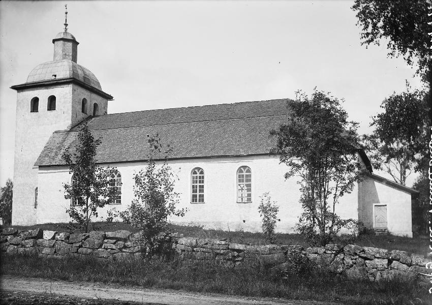 Kyrkan från söder. Kategori: (01) ExteriörerKyrkan från söder.